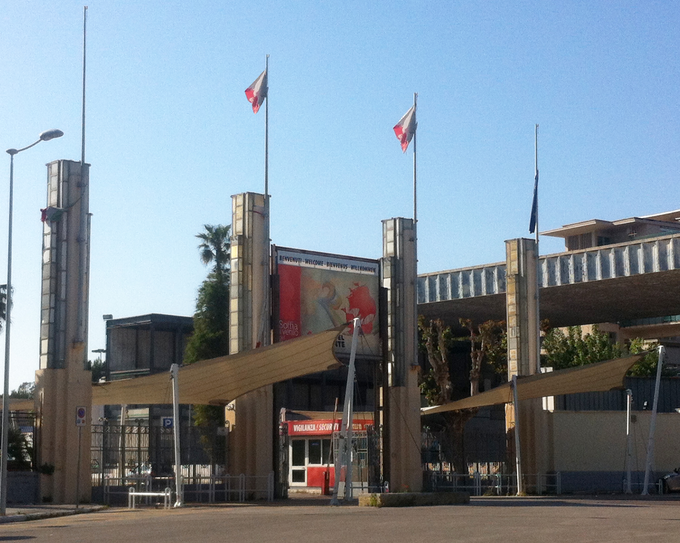 Ingresso Fiera del Levante Italo Orientale (Piazzale Triggiani, Bari)